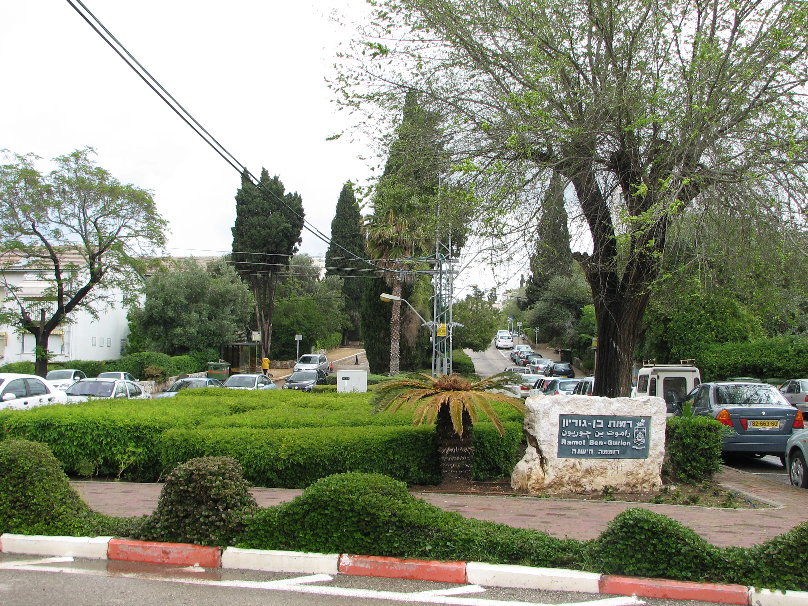 Old Romema Neighborhood, Haifa Israel שכונה בחיפה מצפון לשכונת אחוזה, נוסדה בשנת 1946 על ידי ועד הדר הכרמל על אדמות שנרכשו בשנות העשרים של המאה העשרים על ידי חברת הכשרת הישוב שלט הכניסה לשכונה רחוב פלמ"ח